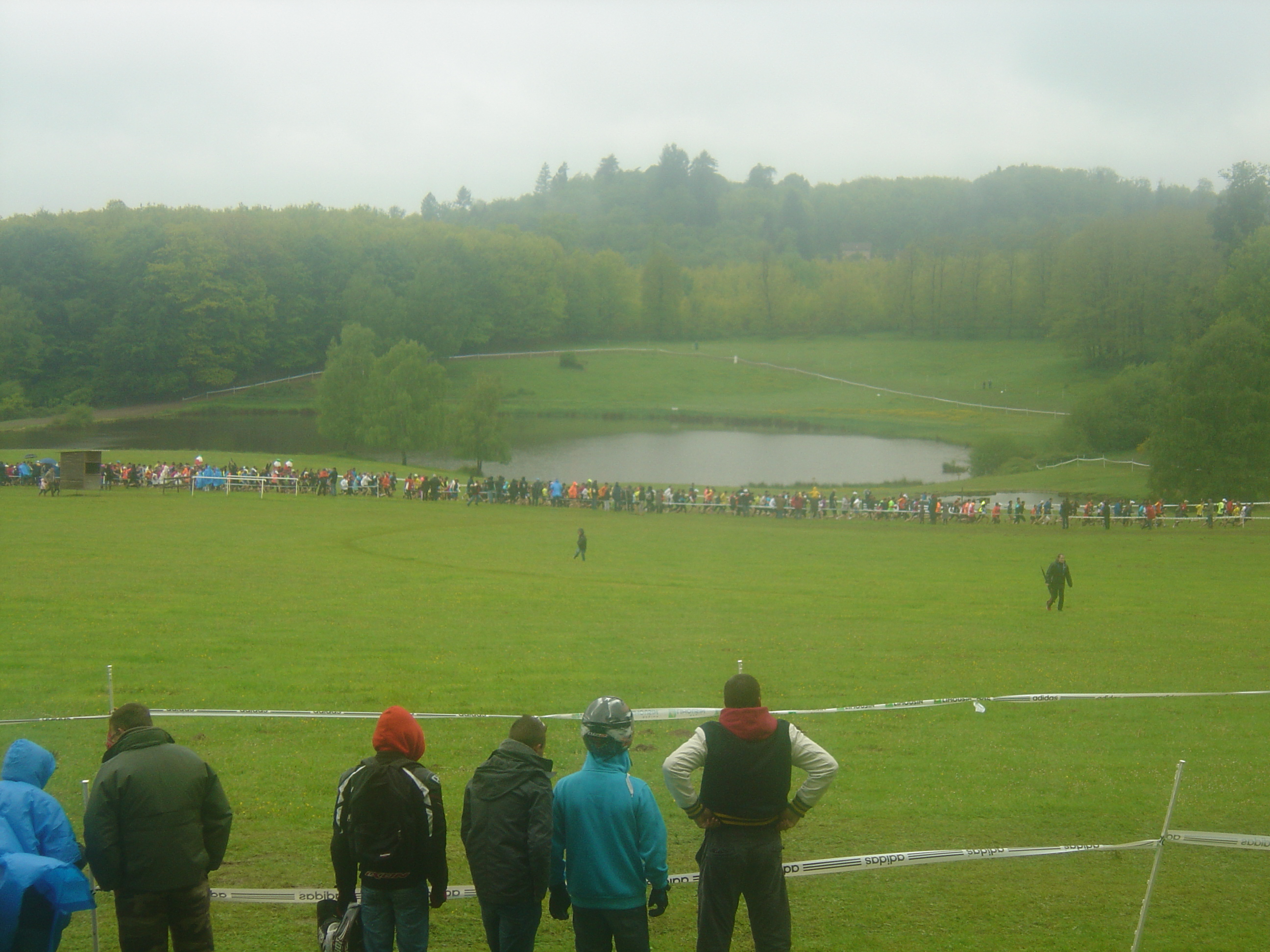 Départ de la course de 10 km des Gendarmes et voleurs de temps 2013 dans la prairie du centre équestre de Muret